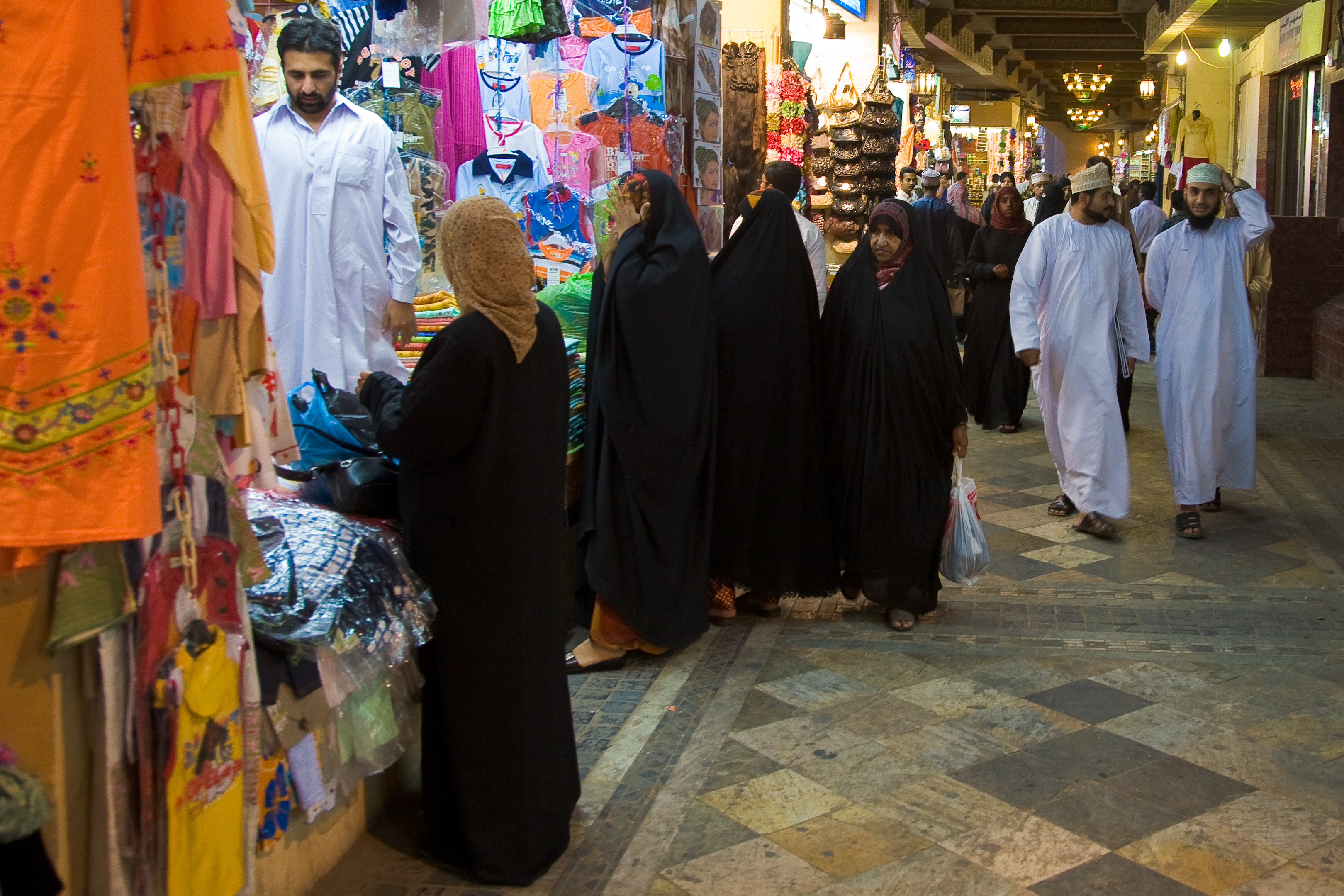 Market in Muttrah, Muscat, Oman